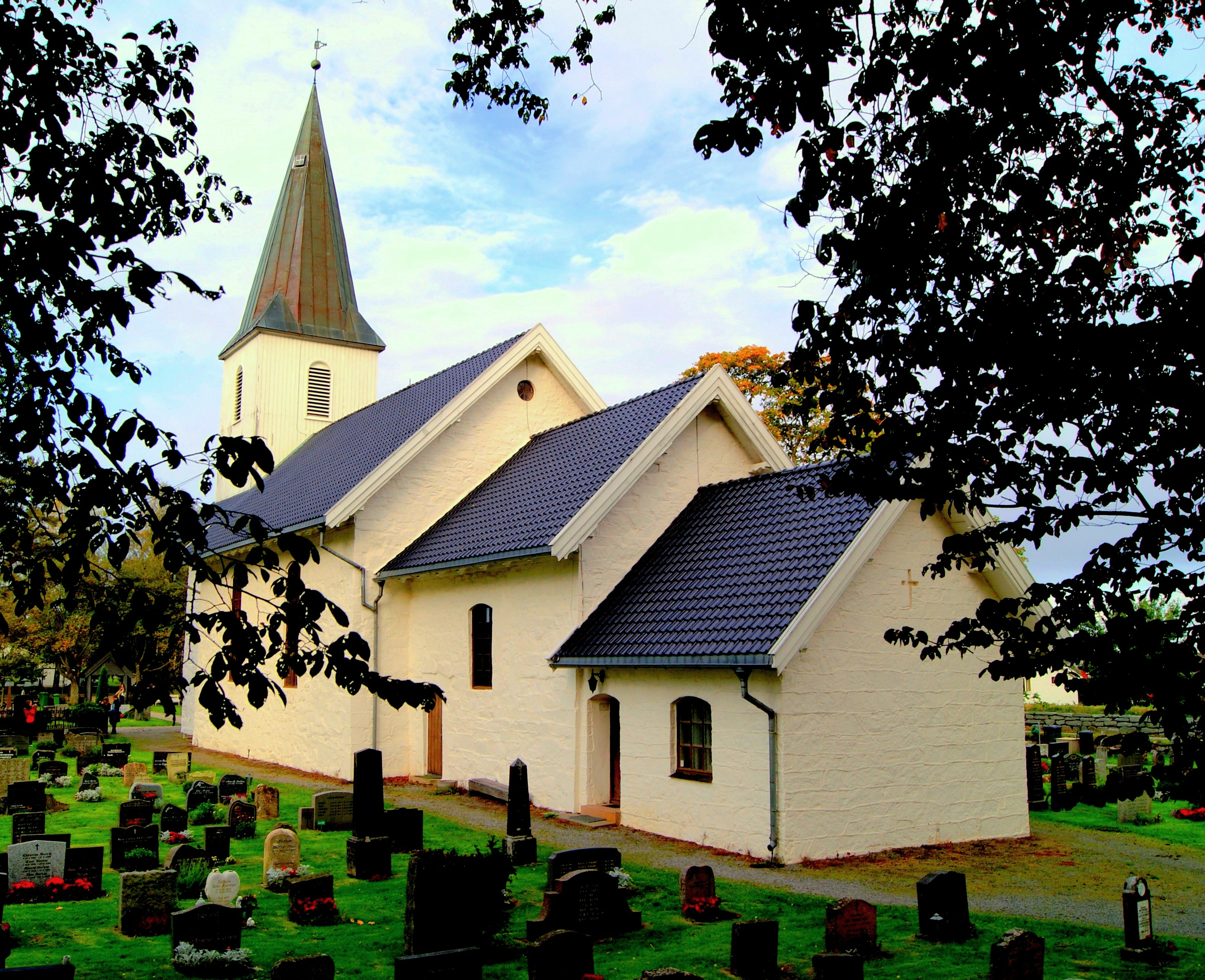 Ski kirkested i Norge